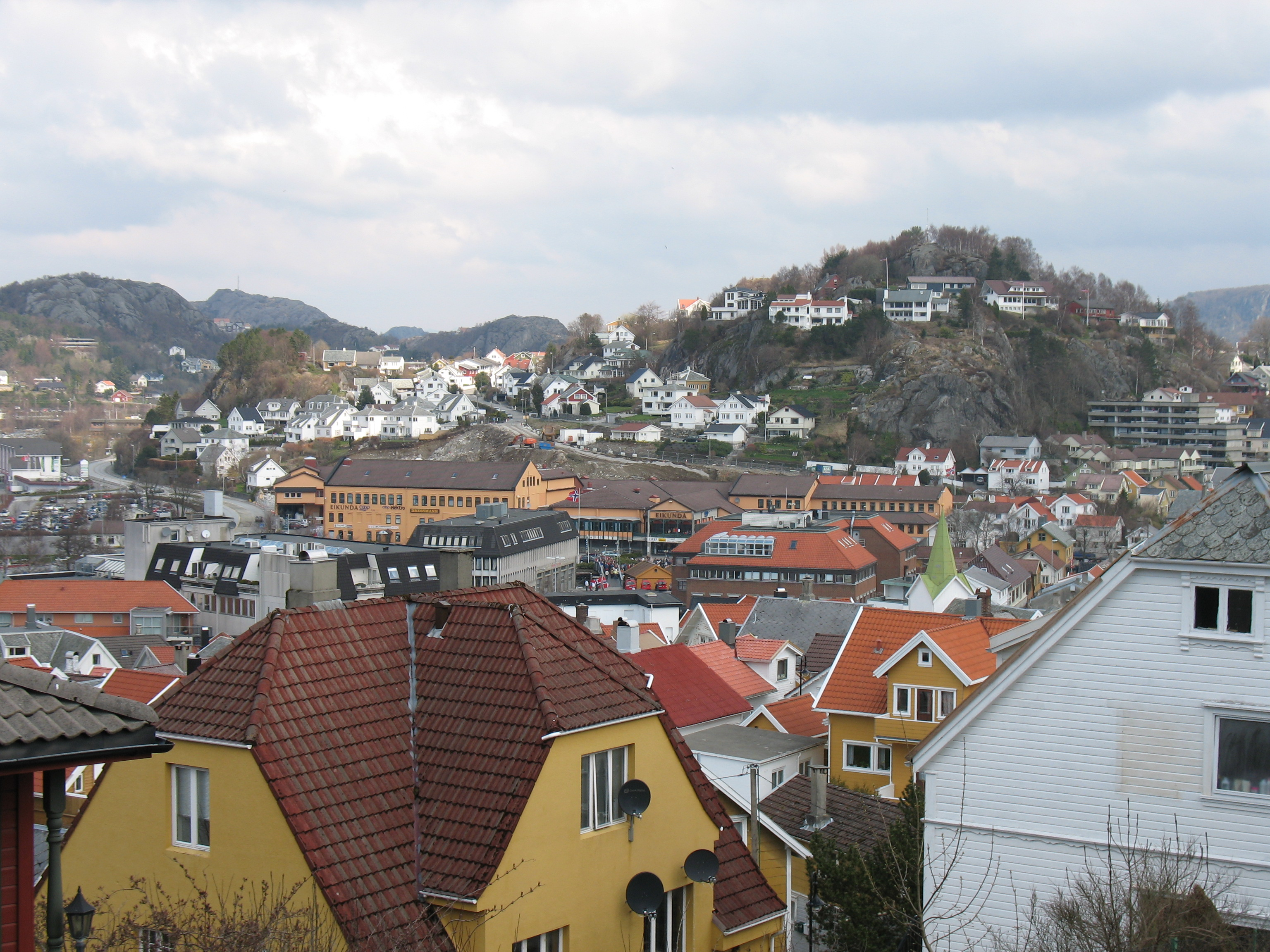 Egersund, Norway